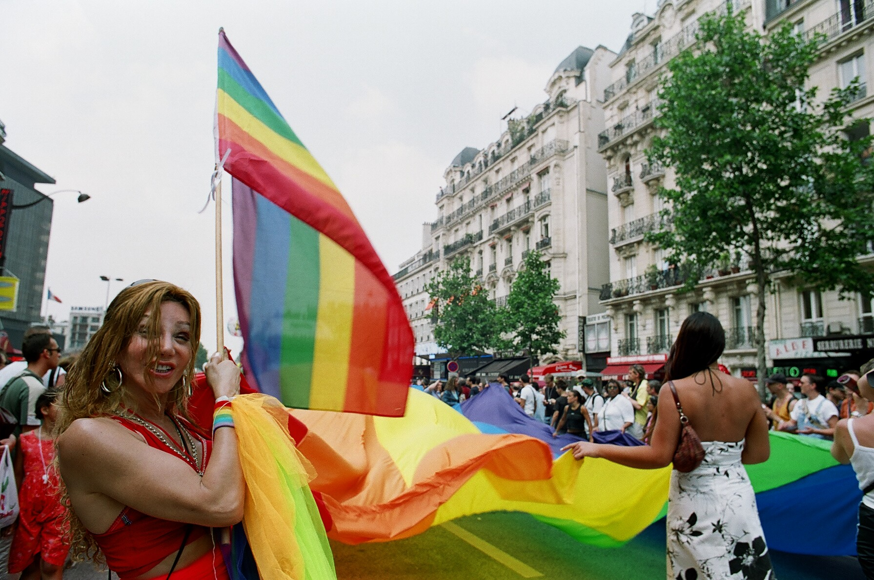 Défilé de PASTT à la Gay Pride à Paris en France. On the left, Camille Cabral.